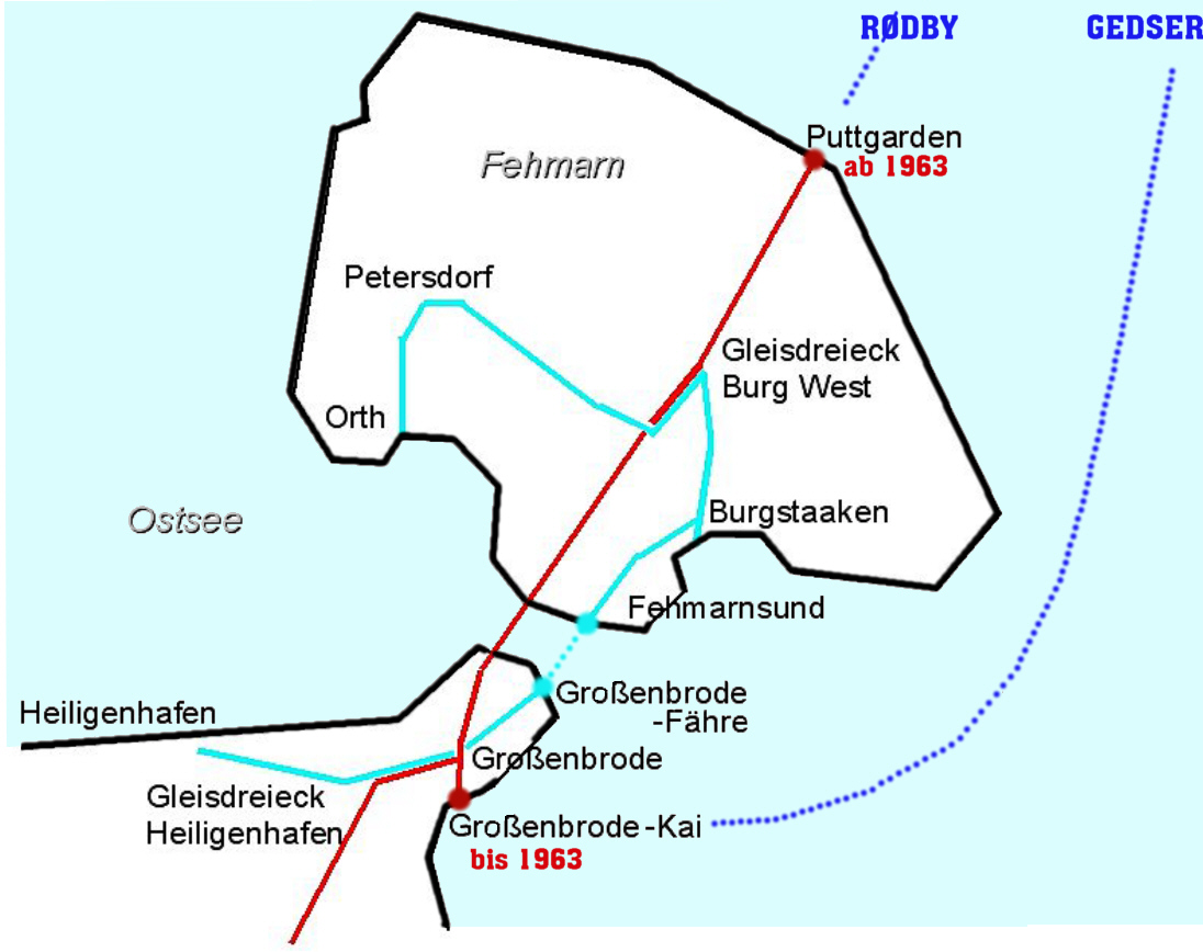 Bahnlinien in der Region um Fehmarn. - hellblau = Inselbahn, rot = Fernbahnverkehr. - Fährbahnhof "Großenbrode-Kai" stillgelegt 1963 nach Inbetriebnahme der "Vogelfluglinie" (Fährbahnhof "Puttgarden" und Fehmarnsund-Brücke)